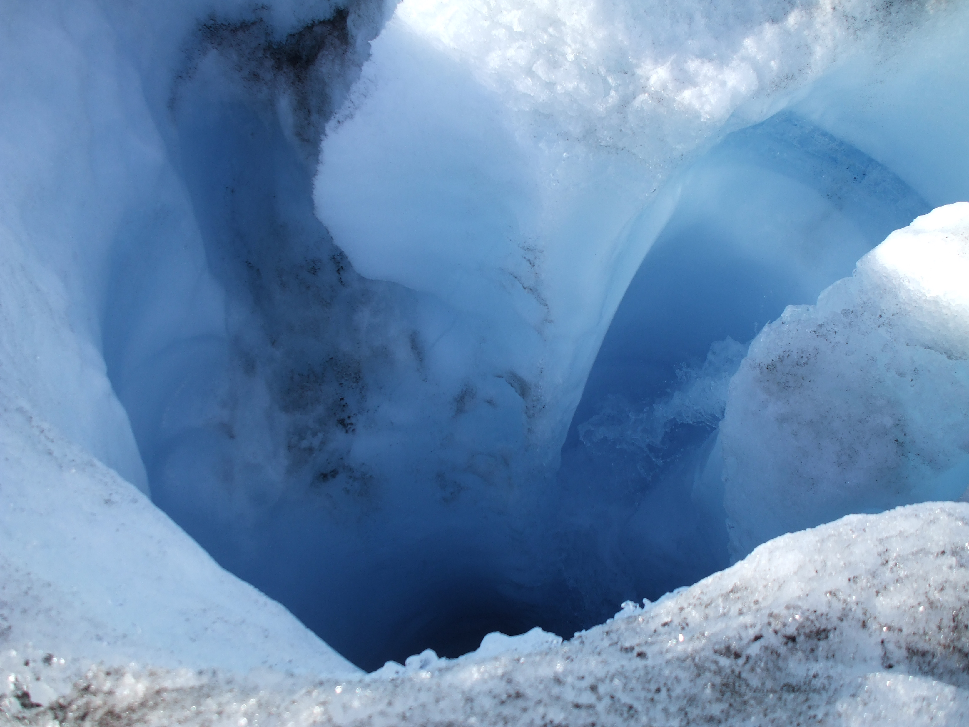 Inlandsis moulin Groenland 2009 Expédition ACarré